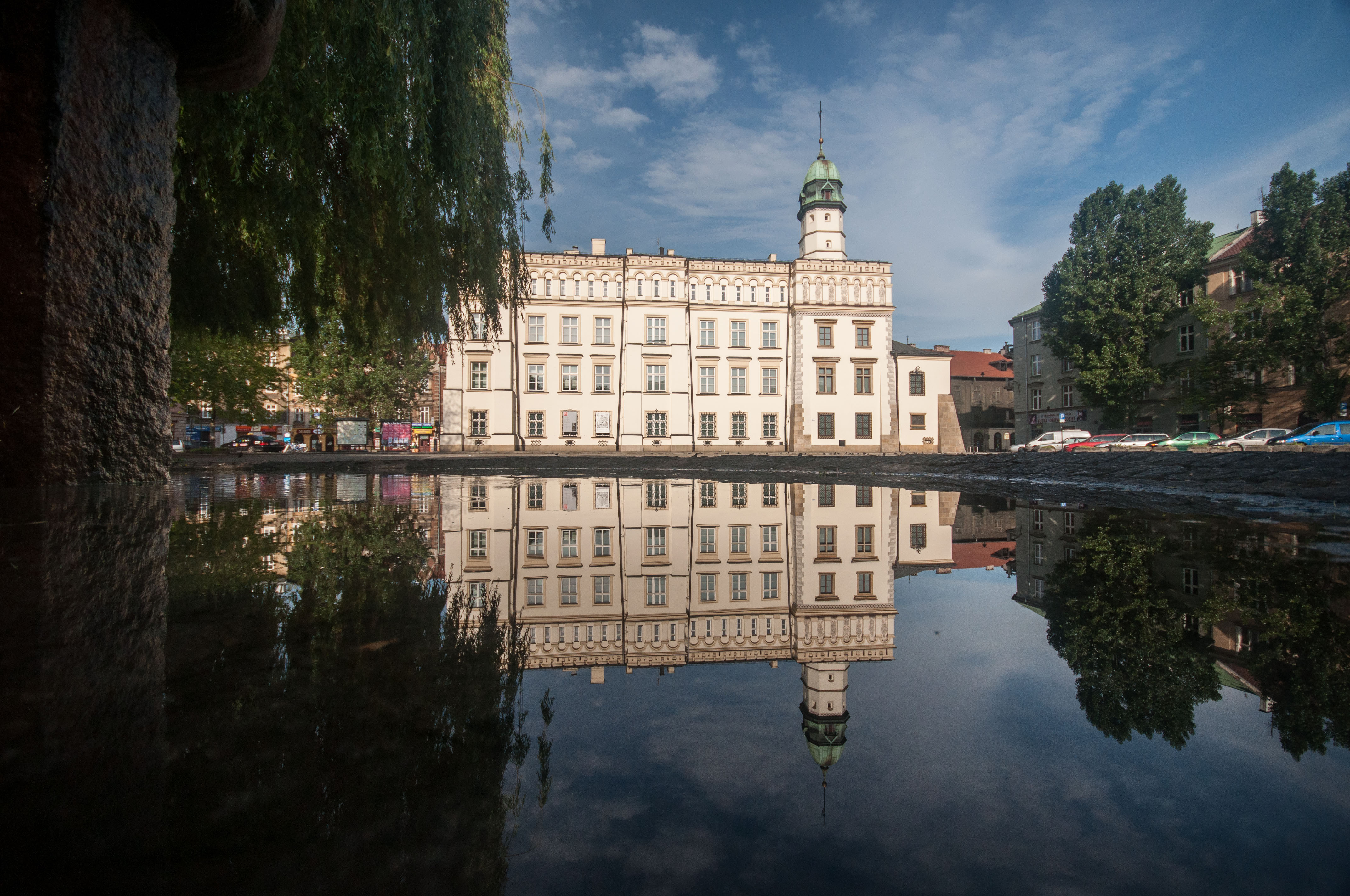 Kraków, ratusz d. miasta Kazimierz, 1578, 1876